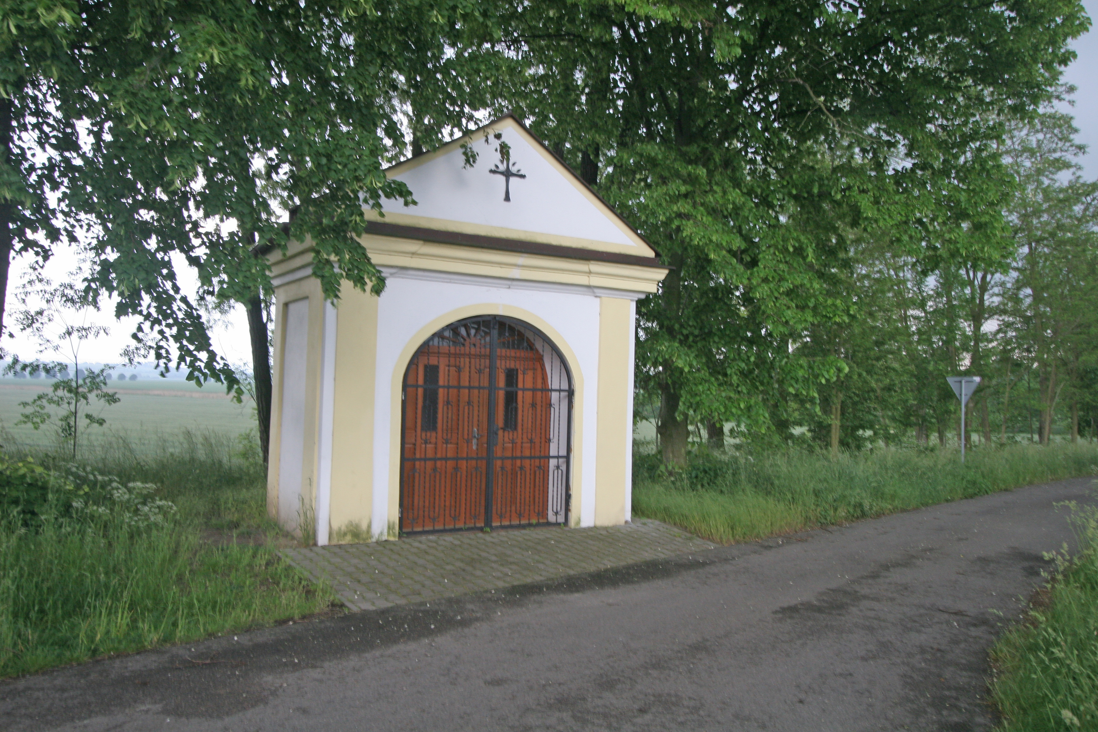 kaple u Dřenic